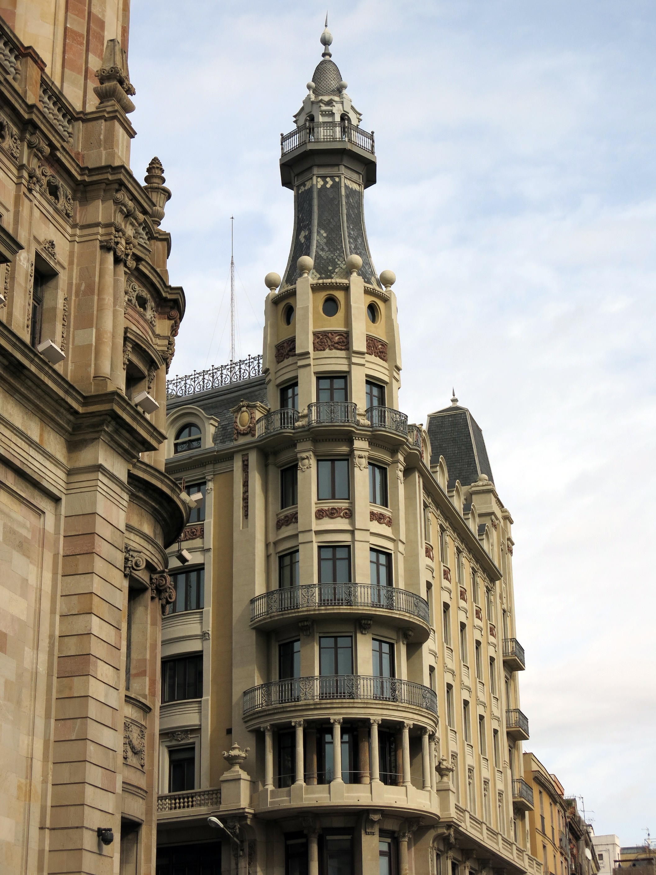 Edifici de la companyia Transmediterrània (Barcelona)